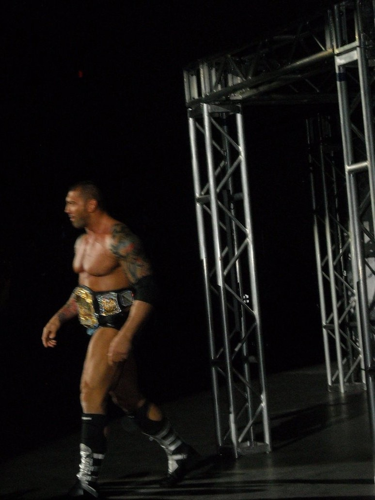 Raw in Ireland